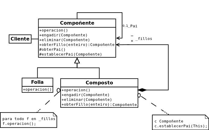 Diagrama dunha variante do patrón composite na que os fillos coñecen cal é seu pai